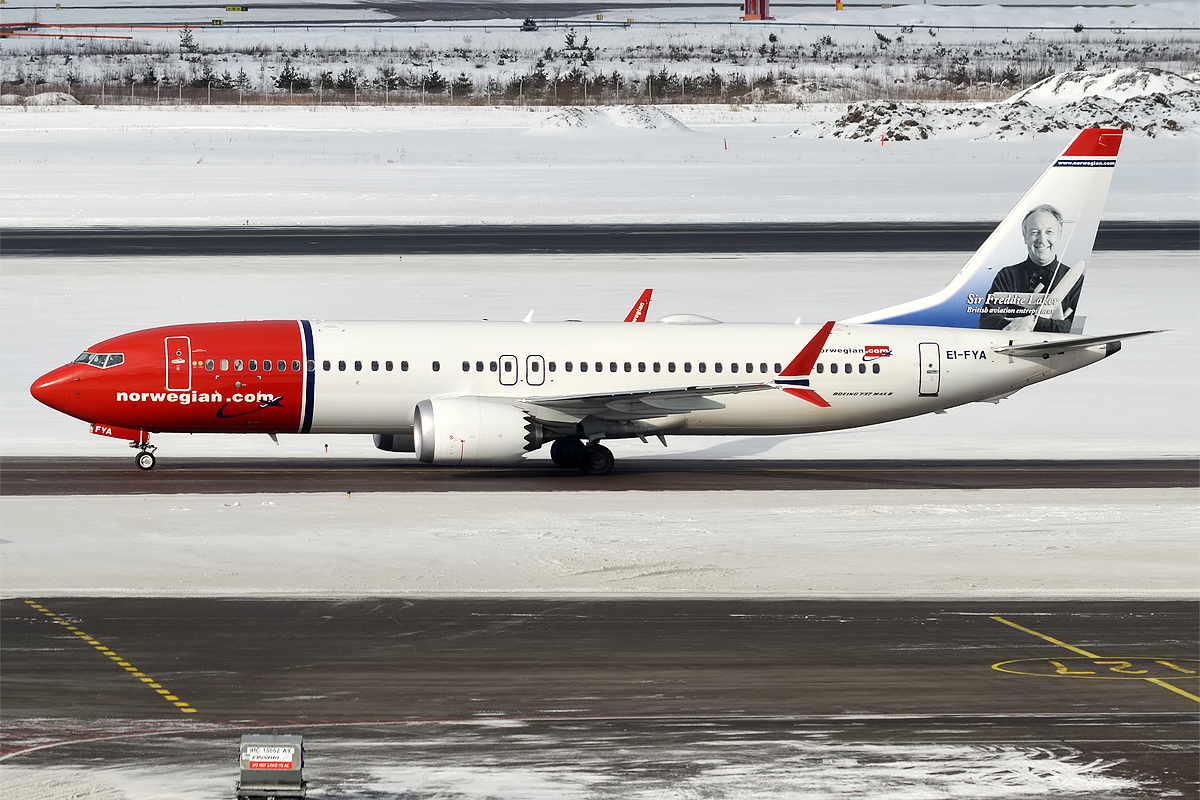 Norwegian, EI-FYA, Boeing 737-8 MAX